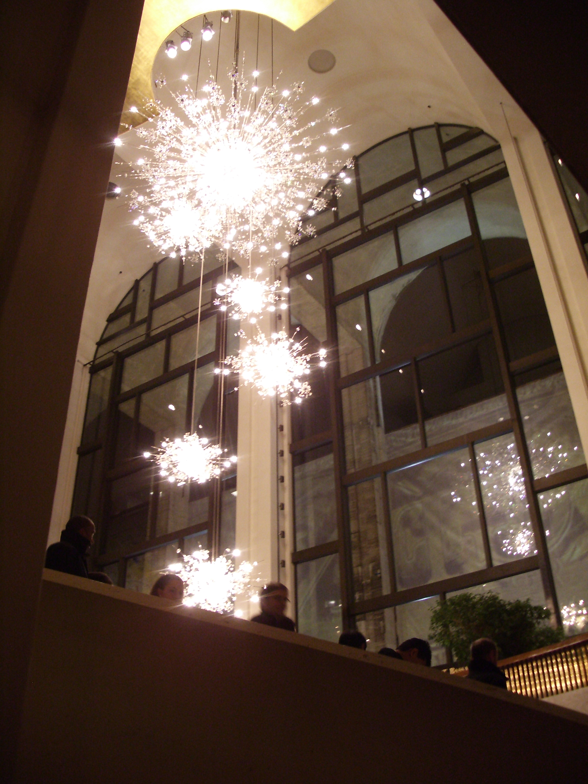 Metropolitan Opera